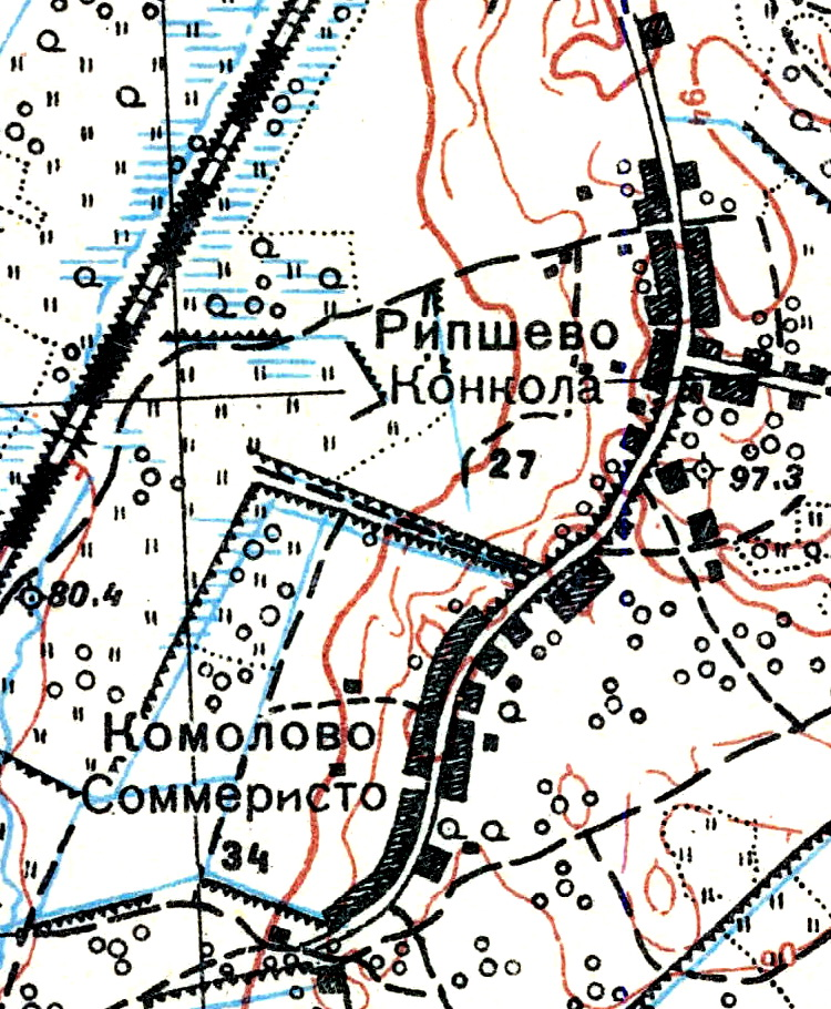 Топографическая карта Ленинградской области, квадрат О-36-13-А-б (Пос. Тайцы), деревня Коммолово